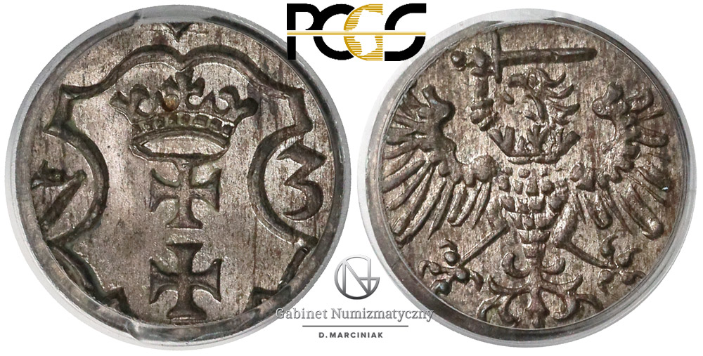 denar 1573 Gdansk bezkrólewie